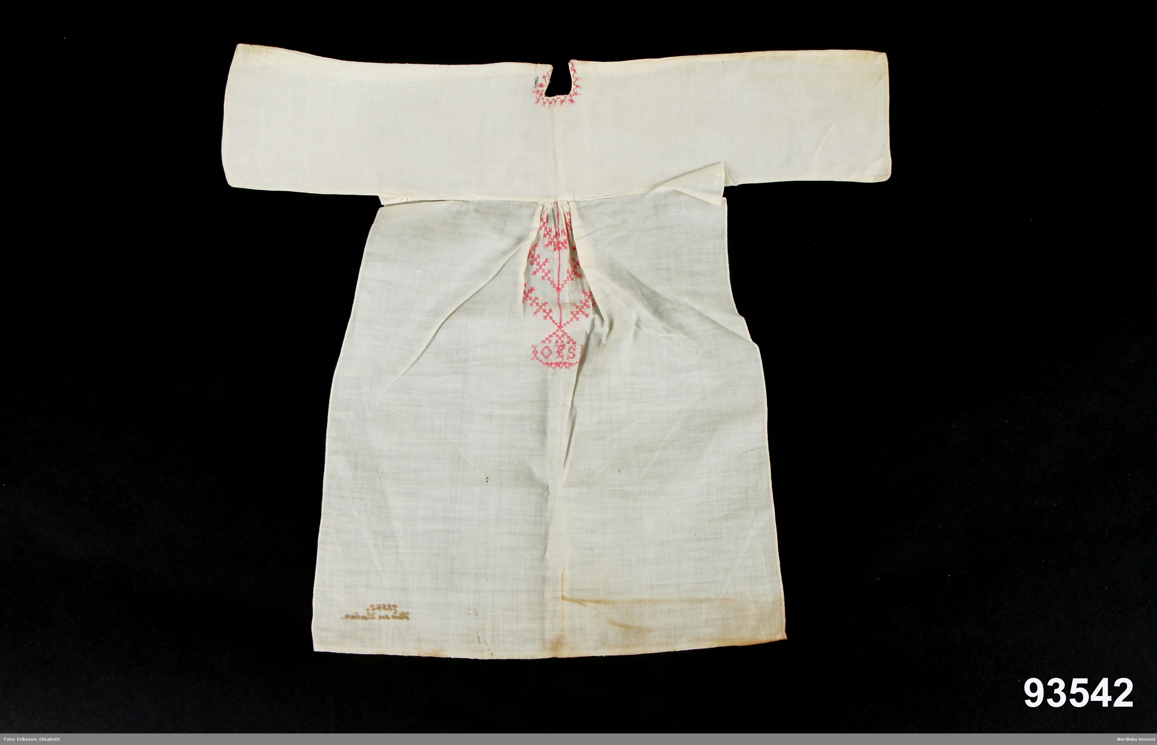 Nattkappa av tuskaftat bomullstyg. Rektangulärt bröststycke, små lagda veck mitt fram och spjäll i kanterna mot kragen. Broderi i form av ett "träd" som avslutas längst ner med initalerna "OES", rosa bomullsgarn, korssöm. Dubbelvikt krage med mindre rundat sprund mitt fram. Sprundet är kantat av broderier i rosa korssöm. Nattkappan är handsydd. /Inga-Lill Eliasson 2007-06-25